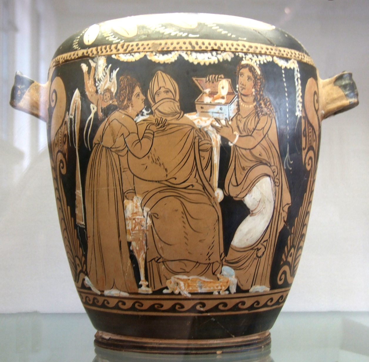 Пиксида с изображением сцены приготовления к свадьбе. Сицилия, группа Адрано, 330-320 гг. до н.э. Глина, лак, белая, голубая, желтая краска, ГМИИ, инв. II 1, 510. Skyphoid pyxis - "Wedding preparation", Sicilia, the Adrano Group, 330-320 BC. Clay, glaze, added white, blue, yellow. Pushkin museum, Moscow